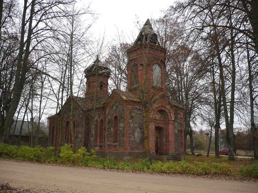 Lēdurgas pareizticīgo baznīca 2007-10-27